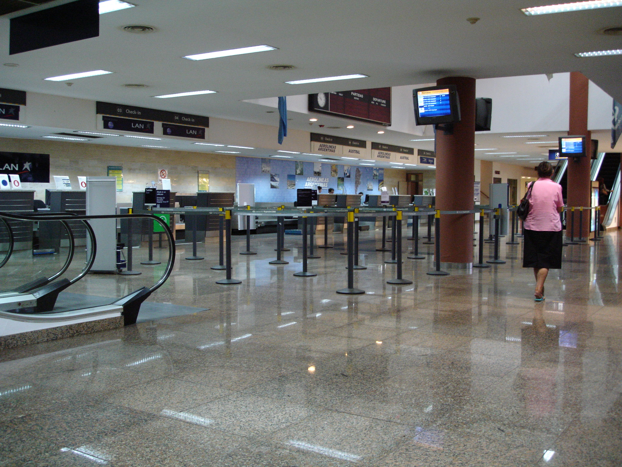 Aeropuerto Internacional de Puerto Iguazú PLANTA BAJA